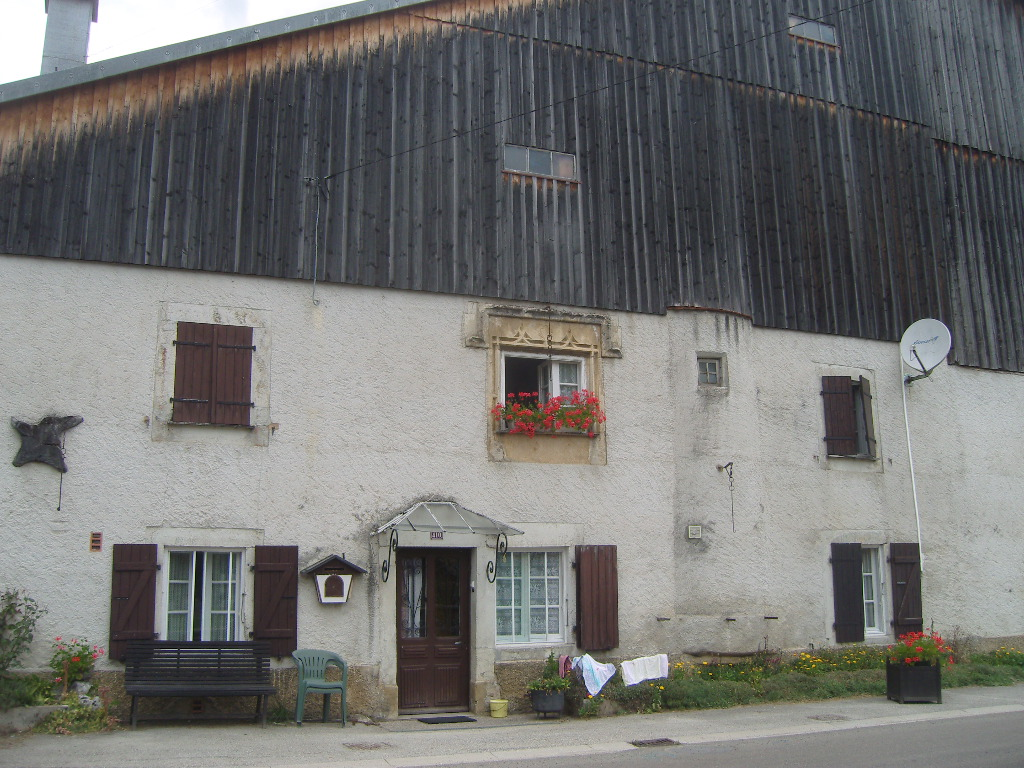 ferme comtoise à Malpas (Doubs - France)